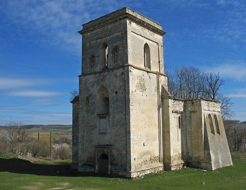 Buszcze - Kościół Wniebowzięcia Najświętszej Maryi Panny